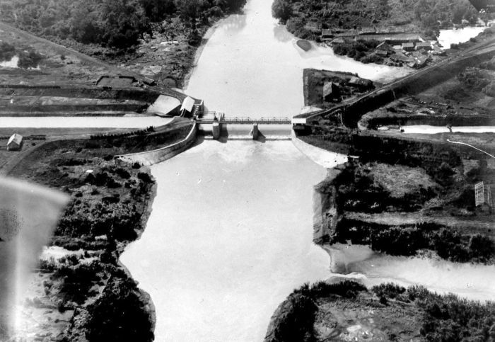 Repronegatief. Luchtfoto van de hoofdwerken voor de bevloeiing van rijstvelden uit de Tjipoenegara-rivier, West-Java